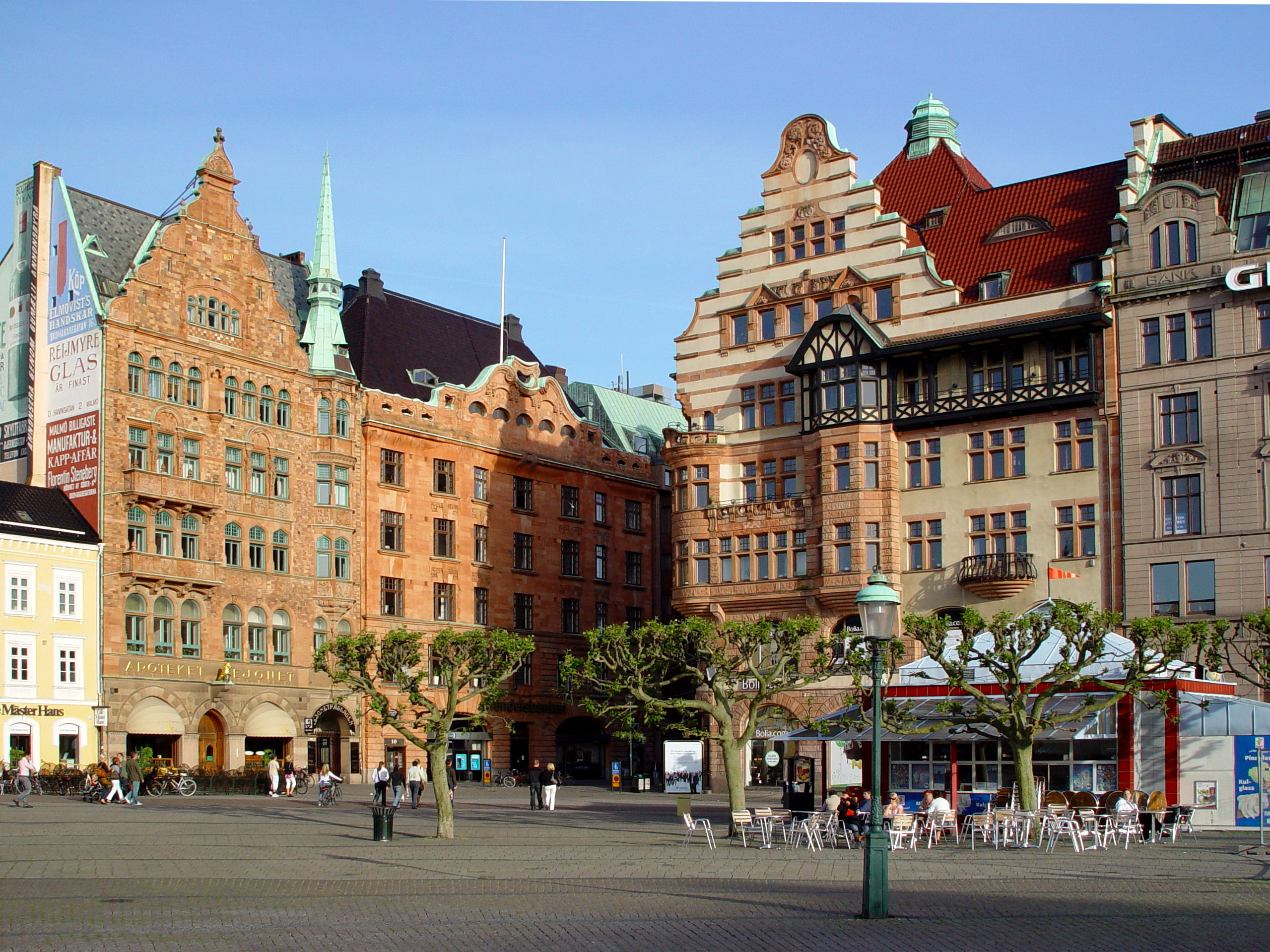 Malmö, Švédsko, 2008